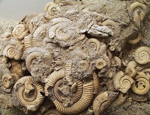 Foto af ammoniter fra Fur Museum.